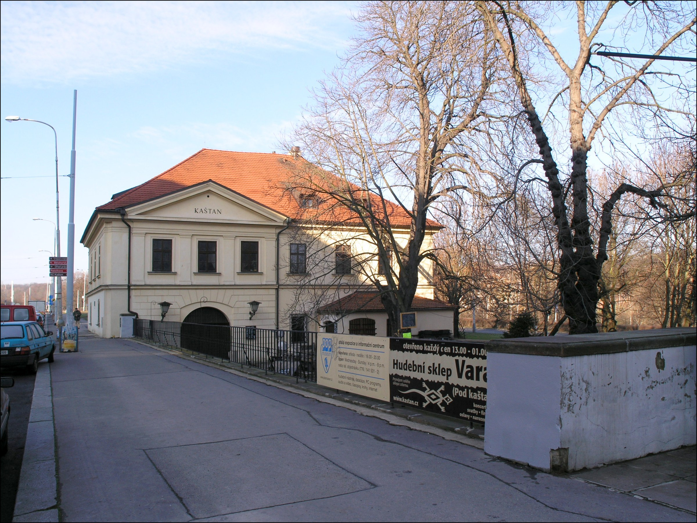 Kulturní dům Kaštan v Praze 6, Břevnově